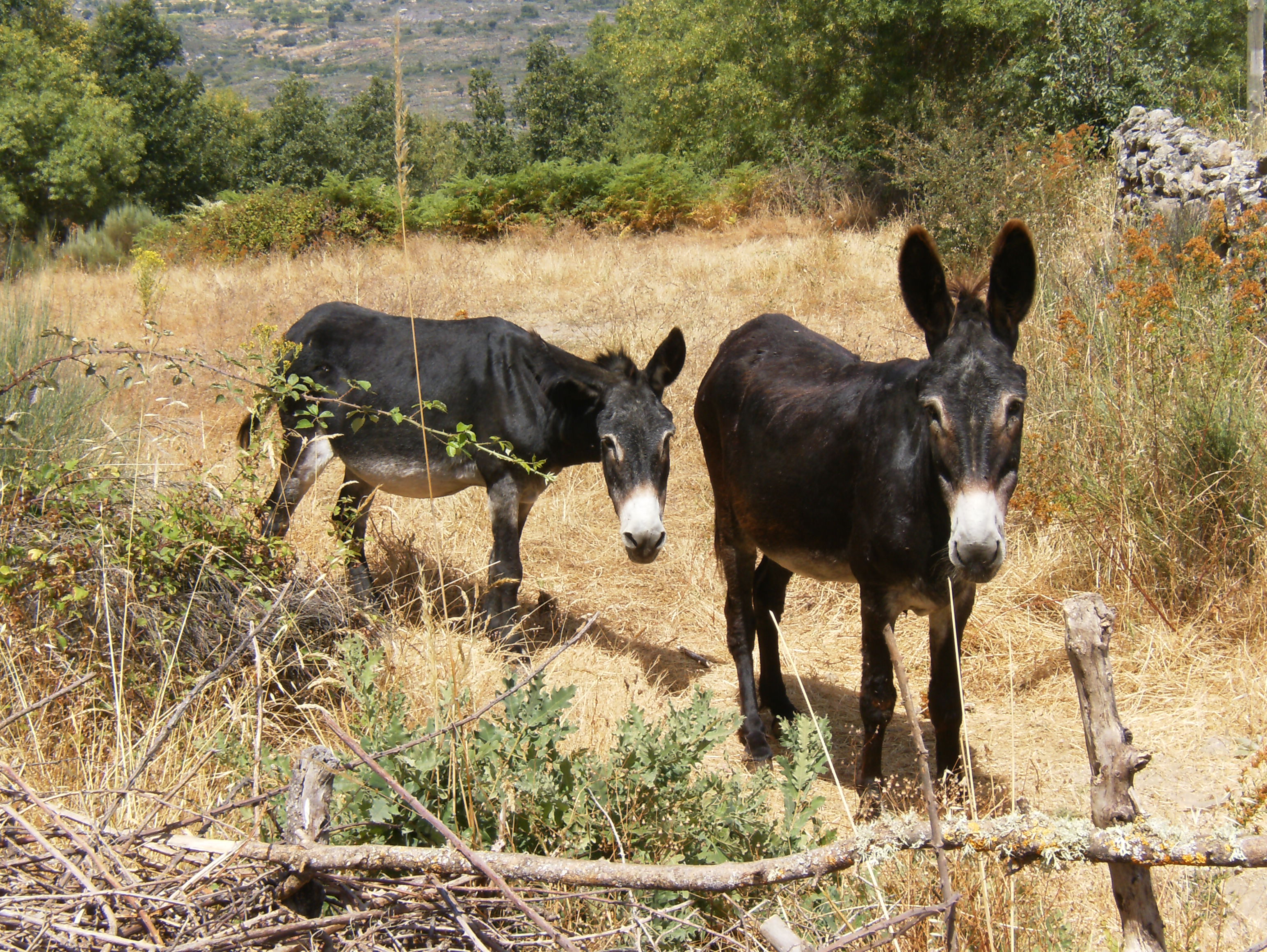 Equus asinus